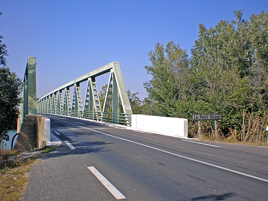 Ancien pont de Sylvéréal sur le Petit-Rhone entre les départements des Bouches-du-Rhône et le Gard - France